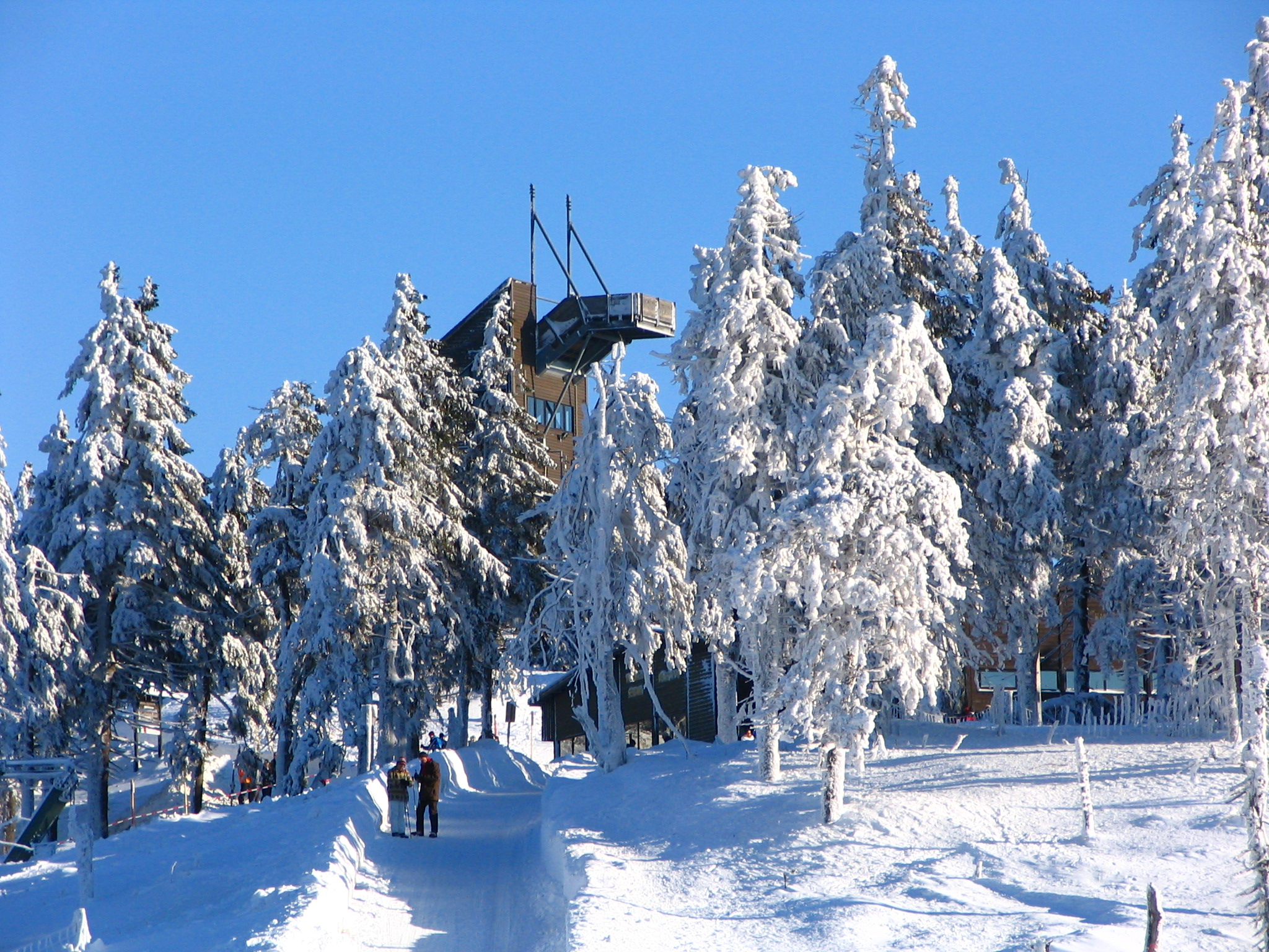 Westseite des Wurmberg-Gipfels mit Wurmbergschanze.